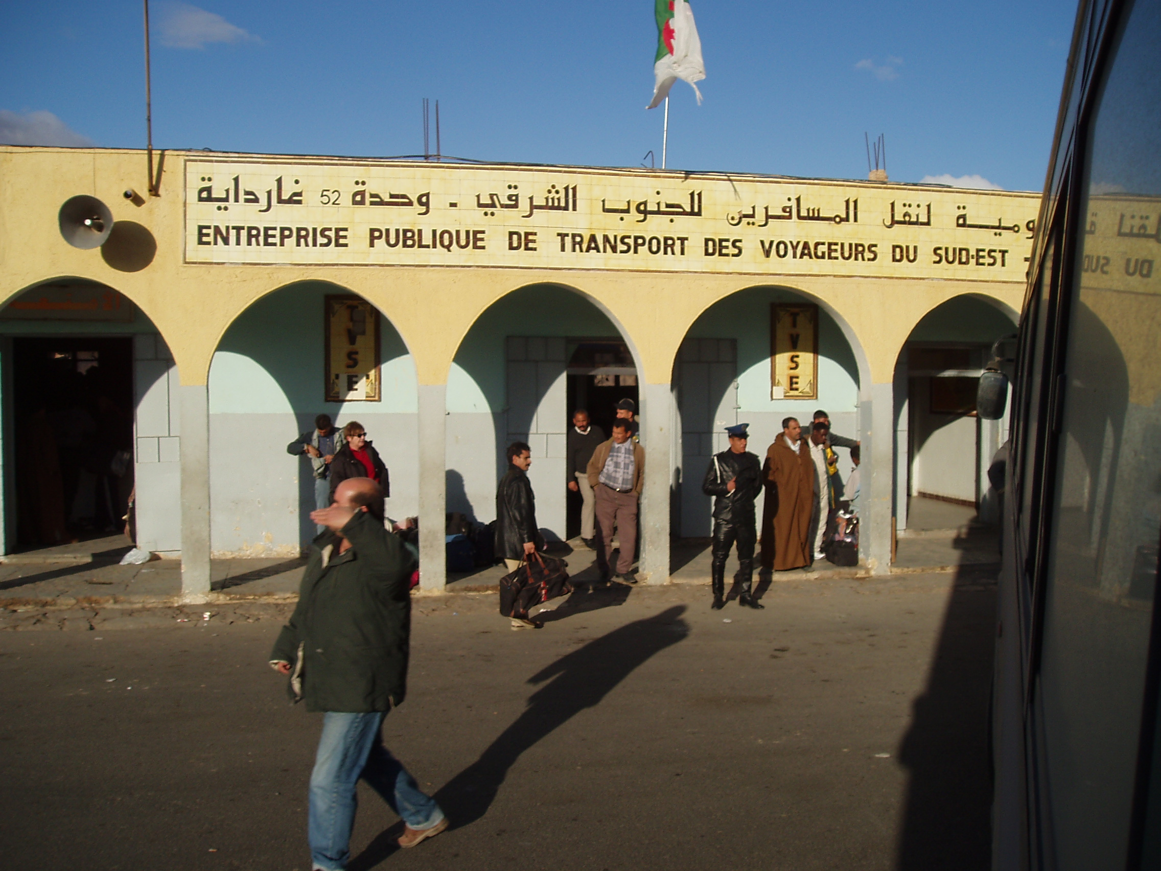 محطة المسافرين غرداية